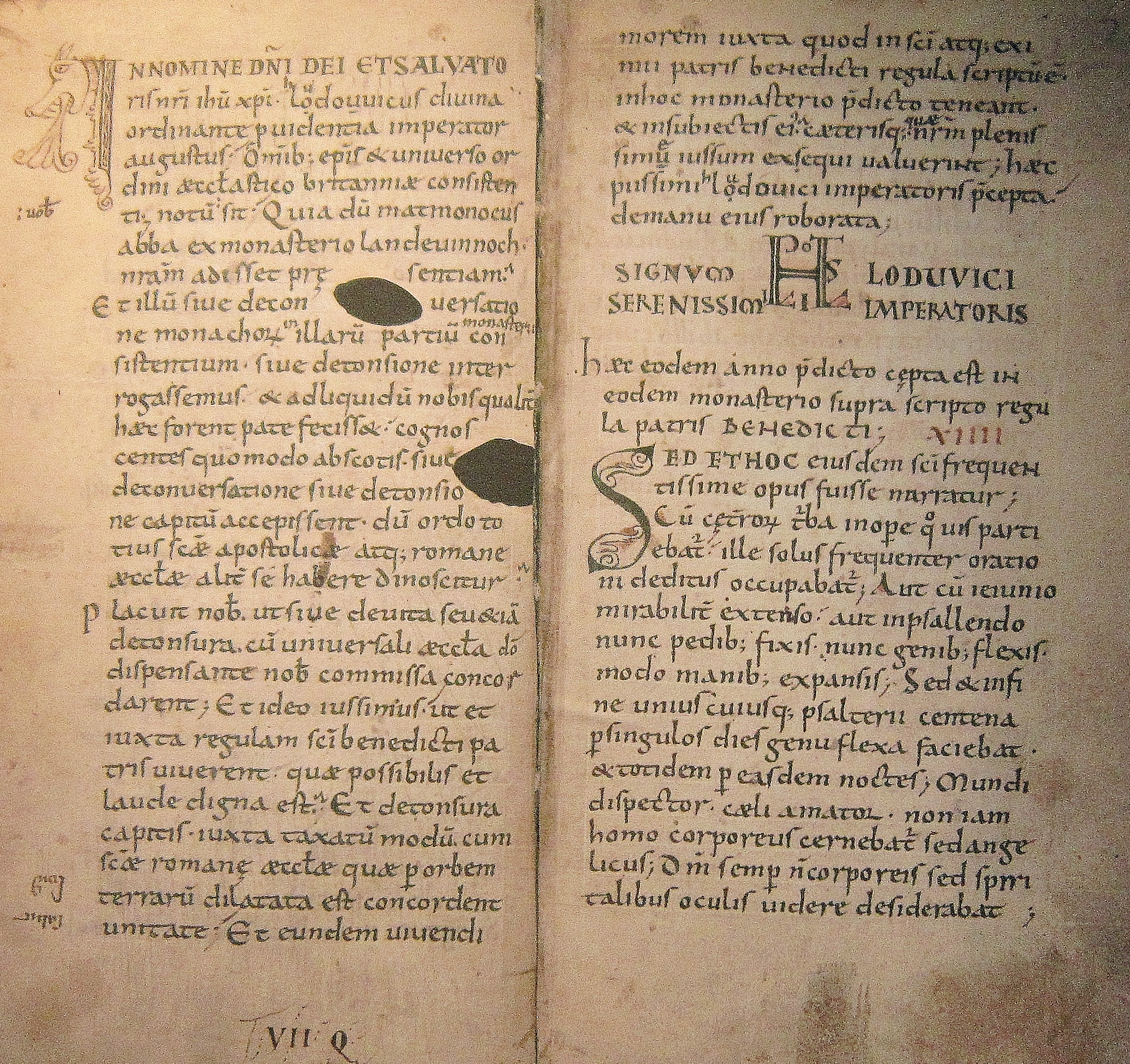 Edit de Louis Le Pieux reproduit dans la "Vie de Saint-Guénolé" (manuscrit datant du Xe ou XIe siècle). Traduction : "Au nom du seigneur Dieu et de notre Sauveur Jésus-Christ, Louis, par décision de la Providence divine empereur auguste, à tous les évêques et à tout l'ordre ecclésiastique établi en Bretagne. Qu'il leur soit reconnu que Matmonoc, abbé du monastère de Landévennec, est venu en notre présence, que nous l'avons interrogé tant sur le mode de vie des moines établis dans les monastères de ces régions que sur leur tonsure et qu'il nous a clairement expliqué ce qu'il en était ; sachant comment ils ont reçu des Scots autant leur mode de vie que la tonsure de leur tête, alors que l'usage de toute la sainte Eglise apostolique et romaine est notoirement différent, il nous a donc plu que , tant sur la vie que sur la mesure, ils s'accordent avec l'église universelle qui, par disposition de Dieu, nous a été confiée. C'est pourquoi nous avons ordonné qu'ils vivent selon la règle du saint père Benoît, laquelle est praticable et digne de louanges ; et, pour la tonsure de leur tête, qu'ils s'unifient, selon la règle qu'elle a fixée, avec la sainte Eglise romaine qui est répandue par toute la terre ; et cette manière de vivre selon la règle du saint et éminent père Benoît, qu'ils l'observent dans le monastère susdit, et qu'ils puissent exécuter le plus complètement notre ordre dans ceux qui lui sont soumis et les autres. Ces préceptes du très pieux empereur Louis ont été confirmés de sa main."